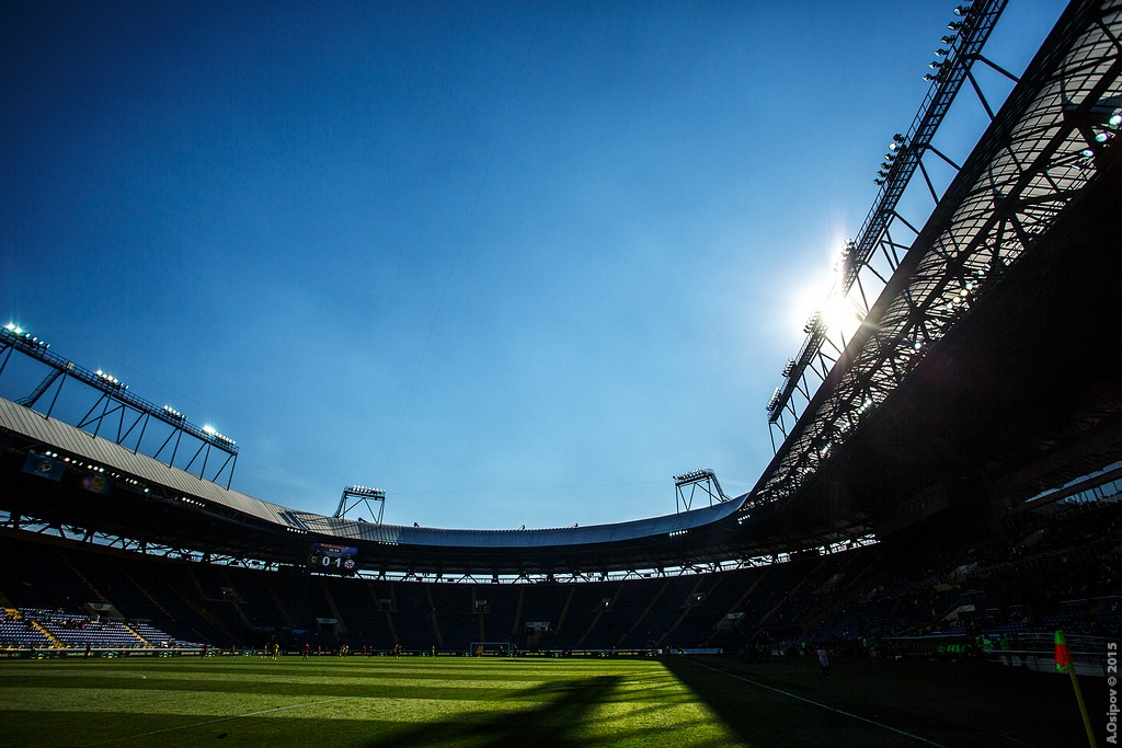 03.10.2015 г.Харьков. Стадион "Металлист". 10-й тур Лиги Пари-Матч Металлист - Сталь Днепродзержинск - 1:1